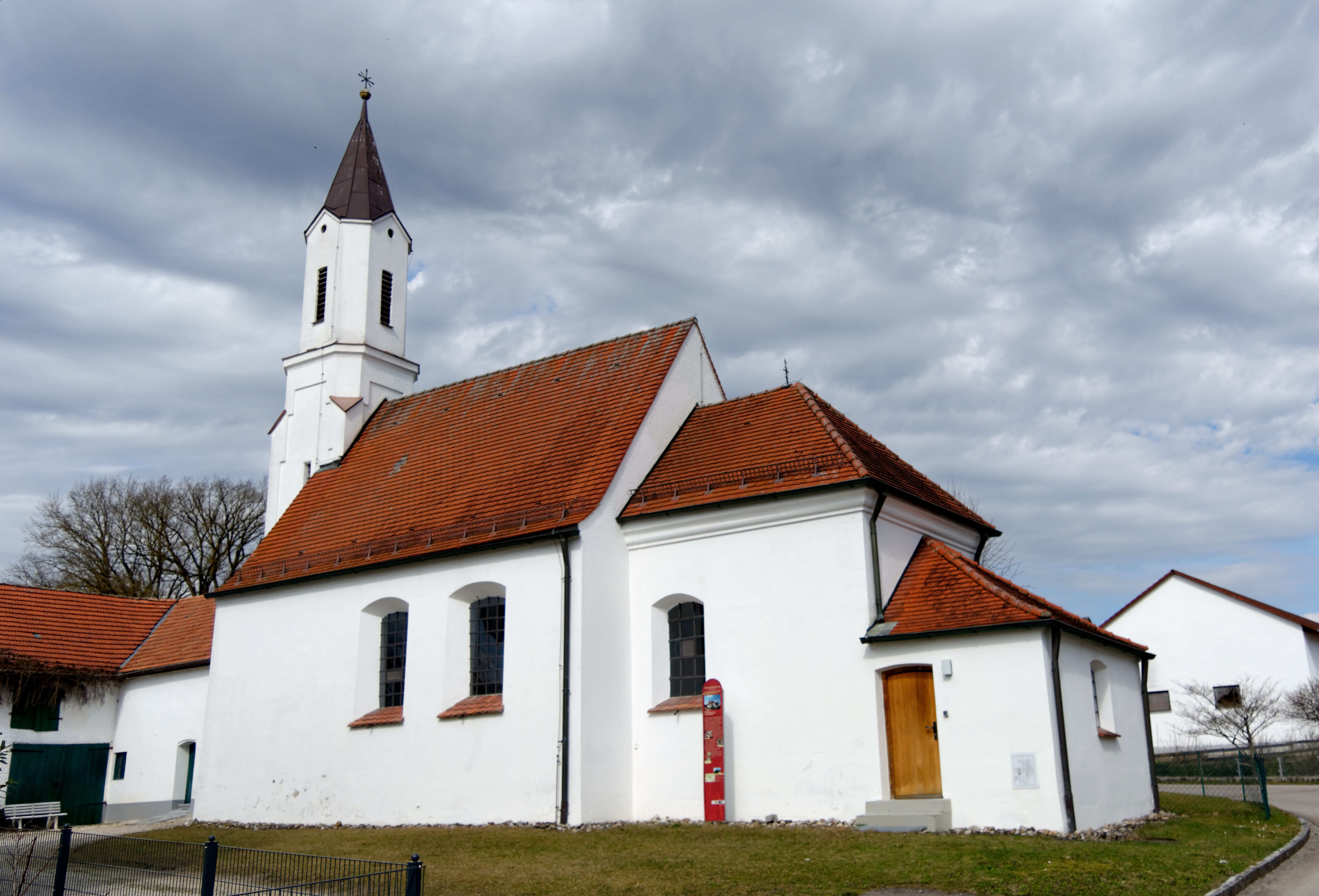 Schlichter Rechteckbau mit Satteldach und westlichem Spitzhelmturm, um 1660 errichtet, im frühen 18. Jahrhundert verändert, Turm 1874. Bayerische Denkmalliste Nr. D-7-71-140-8